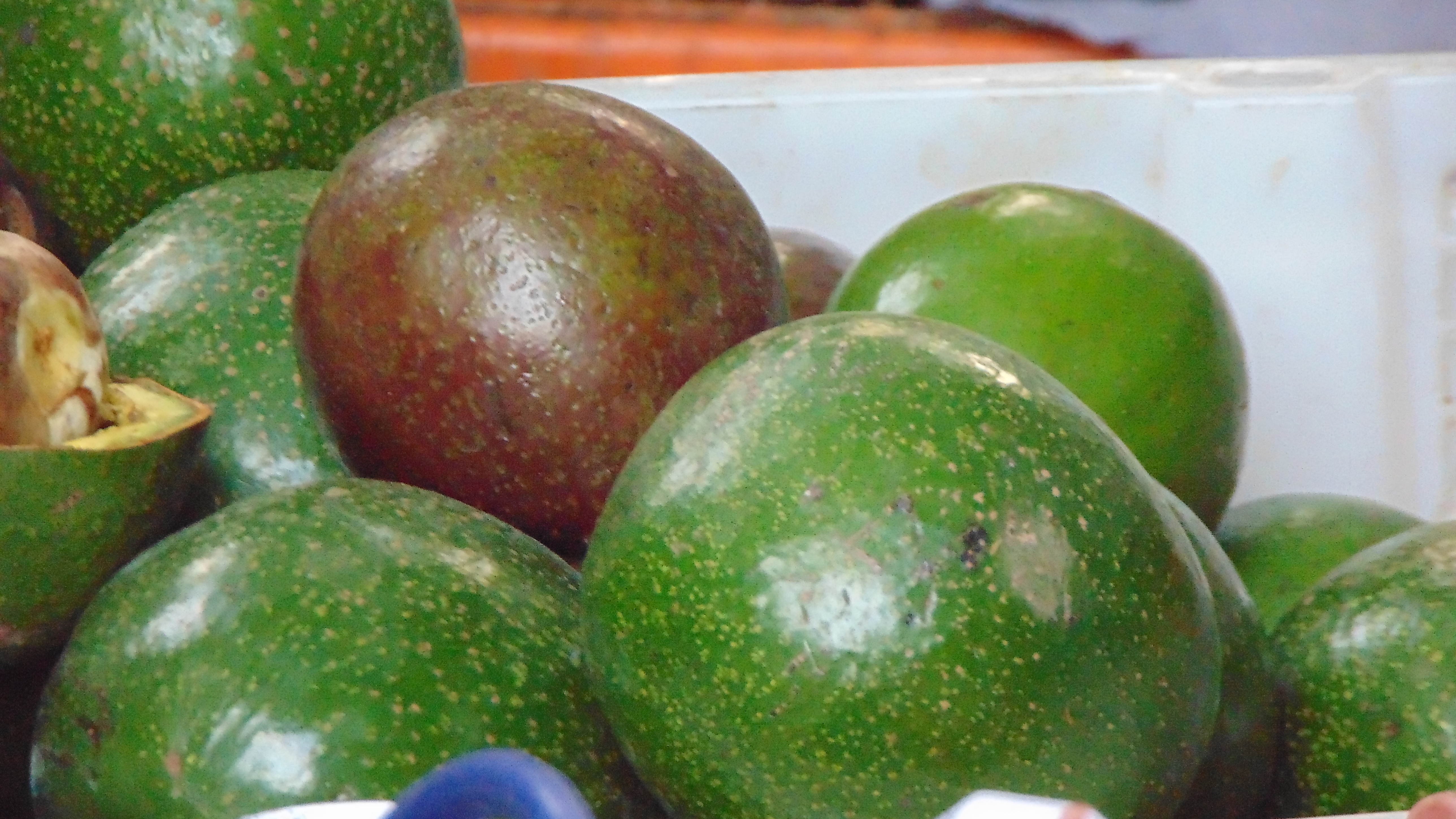 வெண்ணெய் பழம்